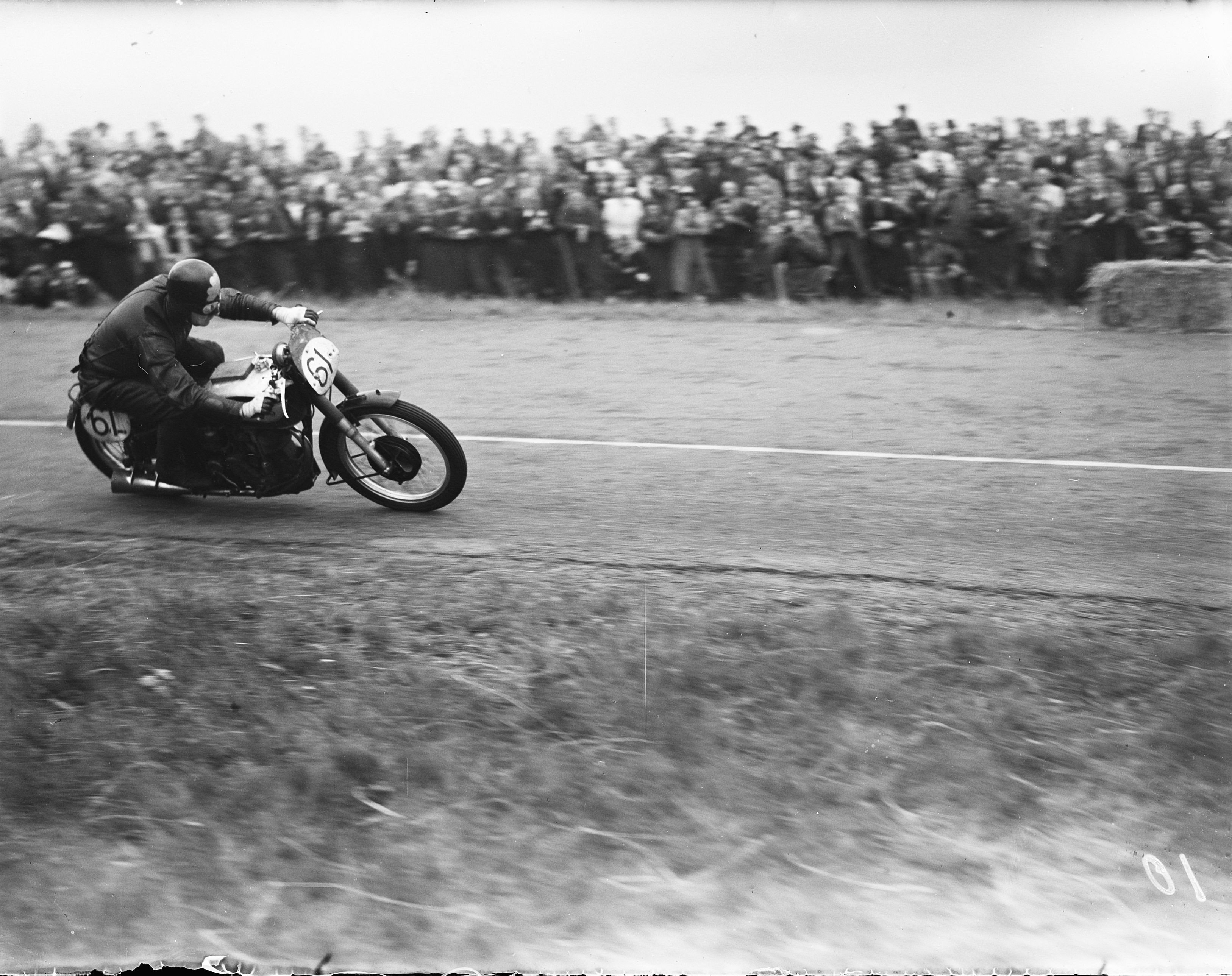 Collectie / Archief : Fotocollectie Anefo Reportage / Serie : TT Assen 1948 Beschrijving : Artie Bell (winnaar 500cc) in een bocht Datum : 26 juni 1948 Locatie : Assen Trefwoorden : bocht, motorsport Persoonsnaam : Bell, Artie Instellingsnaam : TT Fotograaf : Noske, J.D. / Anefo Auteursrechthebbende : Nationaal Archief Materiaalsoort : Glasnegatief Nummer archiefinventaris : bekijk toegang 2.24.01.09 Bestanddeelnummer : 902-8167